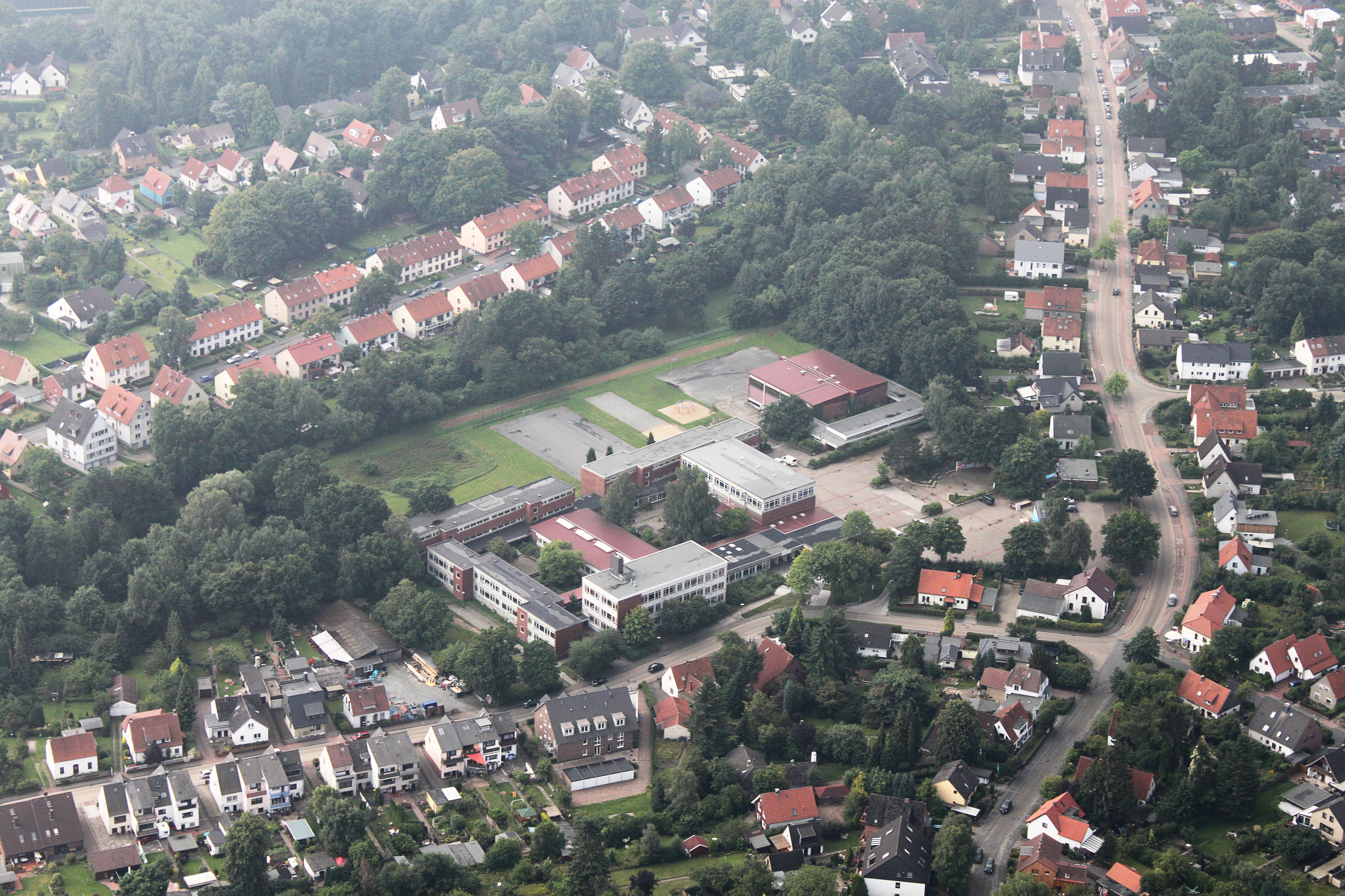 Oberschule Lesum; Bremen-Nord; Steinkamp 6, 28717 Bremen; Fotoflug Bremen; Flughöhe 500 m; von der Autobahnabfahrt der A 27 in Bremen-Nord über Vegesack zum U-Boot Bunker Valentin